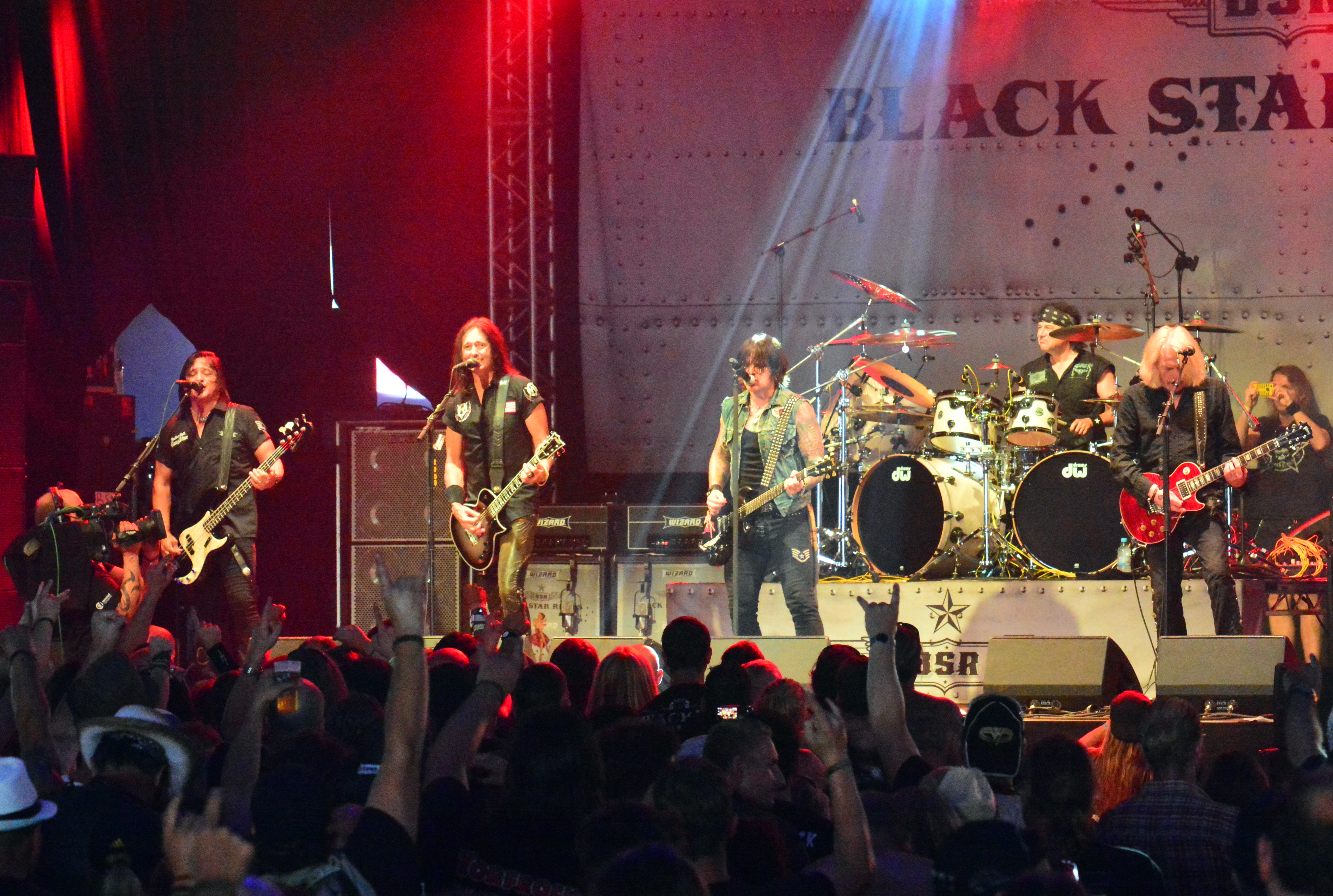 Black Star Riders beim Wacken Open Air 2014